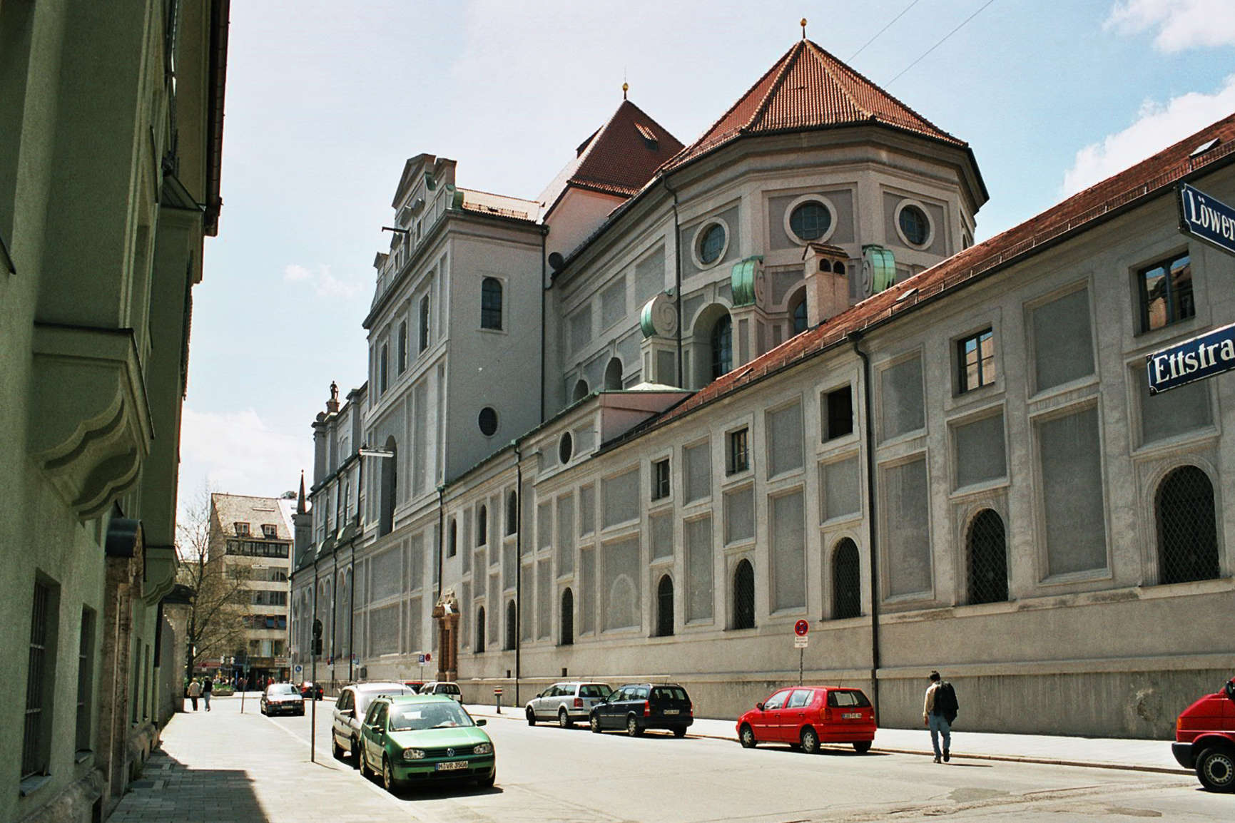 München, St. Michael in der Altstadt, Ostseite an der Ettstraße mit der Kreuzkapelle.